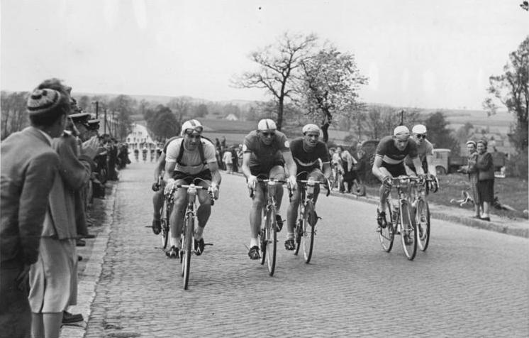 Klabinski, Vesely, Dimoff, Brittain, Schur Zentralbild CAF-V So-Ku 18.5.1955 - Die VIII. Internationale Friedensfahrt Prag-Berlin-Warschau 1955. Am 14. Mai erreichten die Friedensfahrer die Volksrepublik Polen. UBz: Die Spitzengruppe während der 10. Etappe Zgorzelec - Wroclaw am 14.Mai. (von links n. rechts: W. Klabinski (Polen), Vesely (CSR), der spätere Sieger der 10. Etappe, Dimoff (Bulgarien), Brittain (England) und der beste Einzelfahrer Schur (DDR). Information added by Wikimedia users.